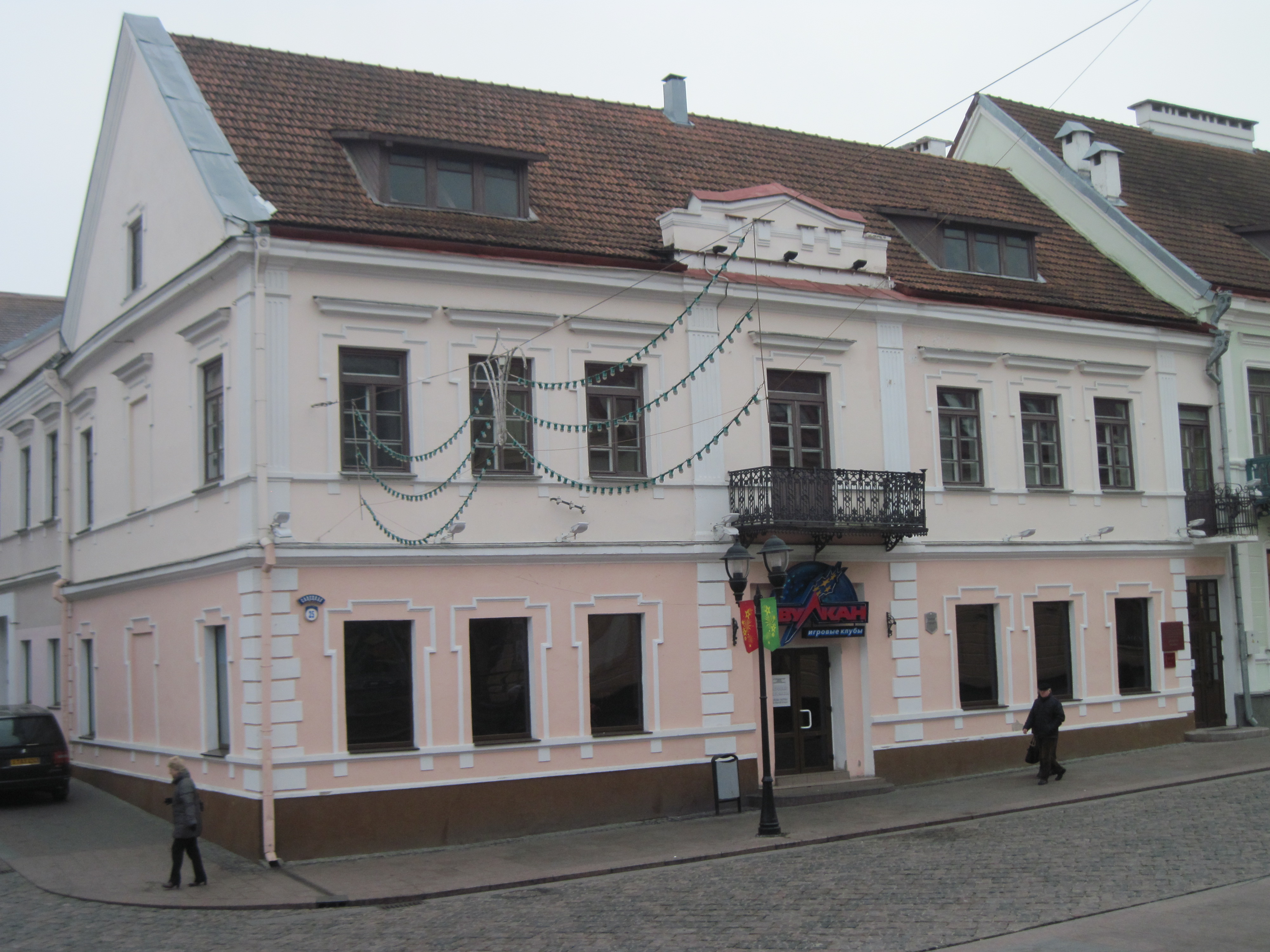 Беларуская (тарашкевіца): Фотаздымак дома №27 па вулицы Савецкая, Гродна